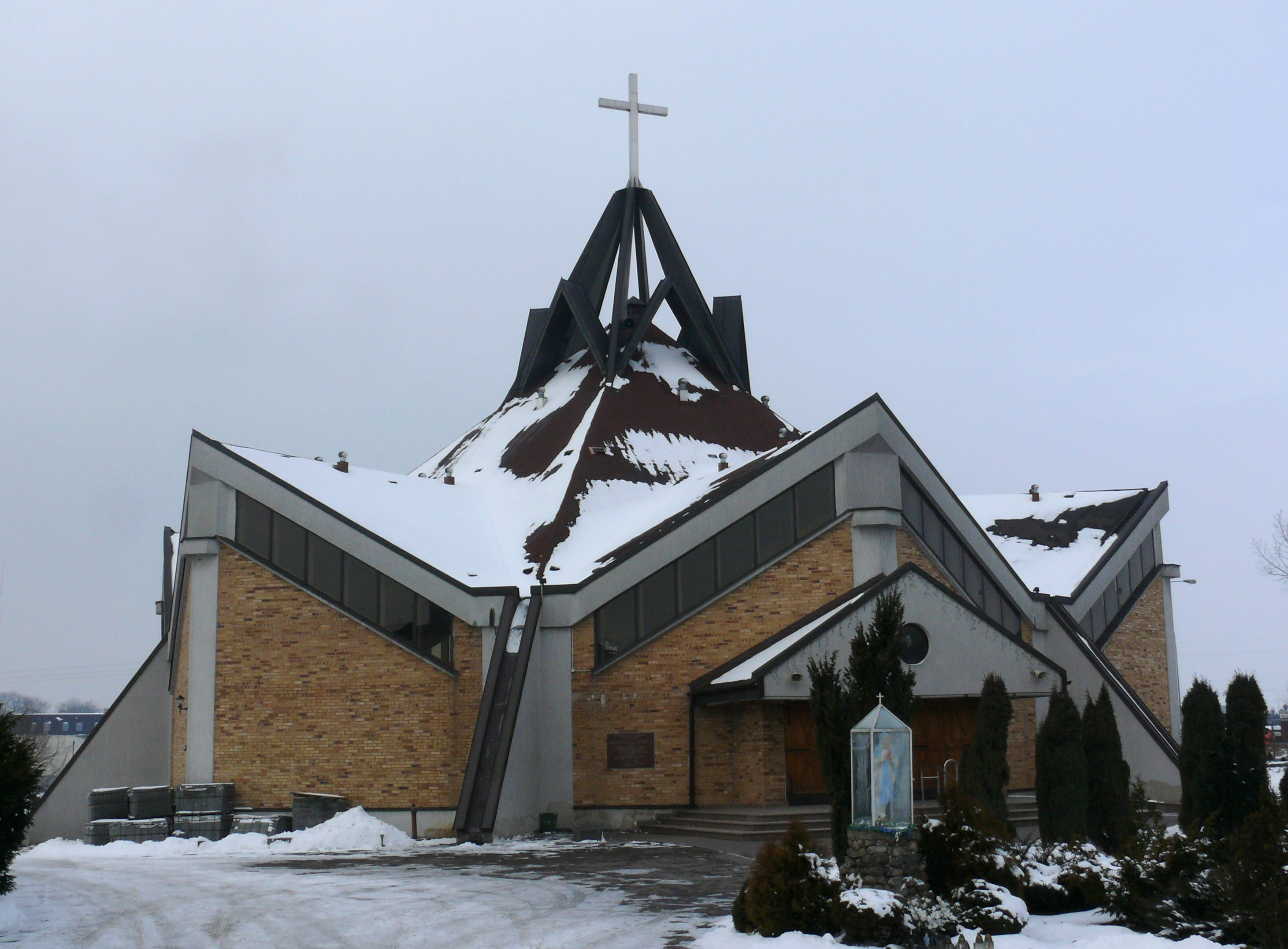 Kościół Świętego Michała Kozala Biskupa i Męczennika